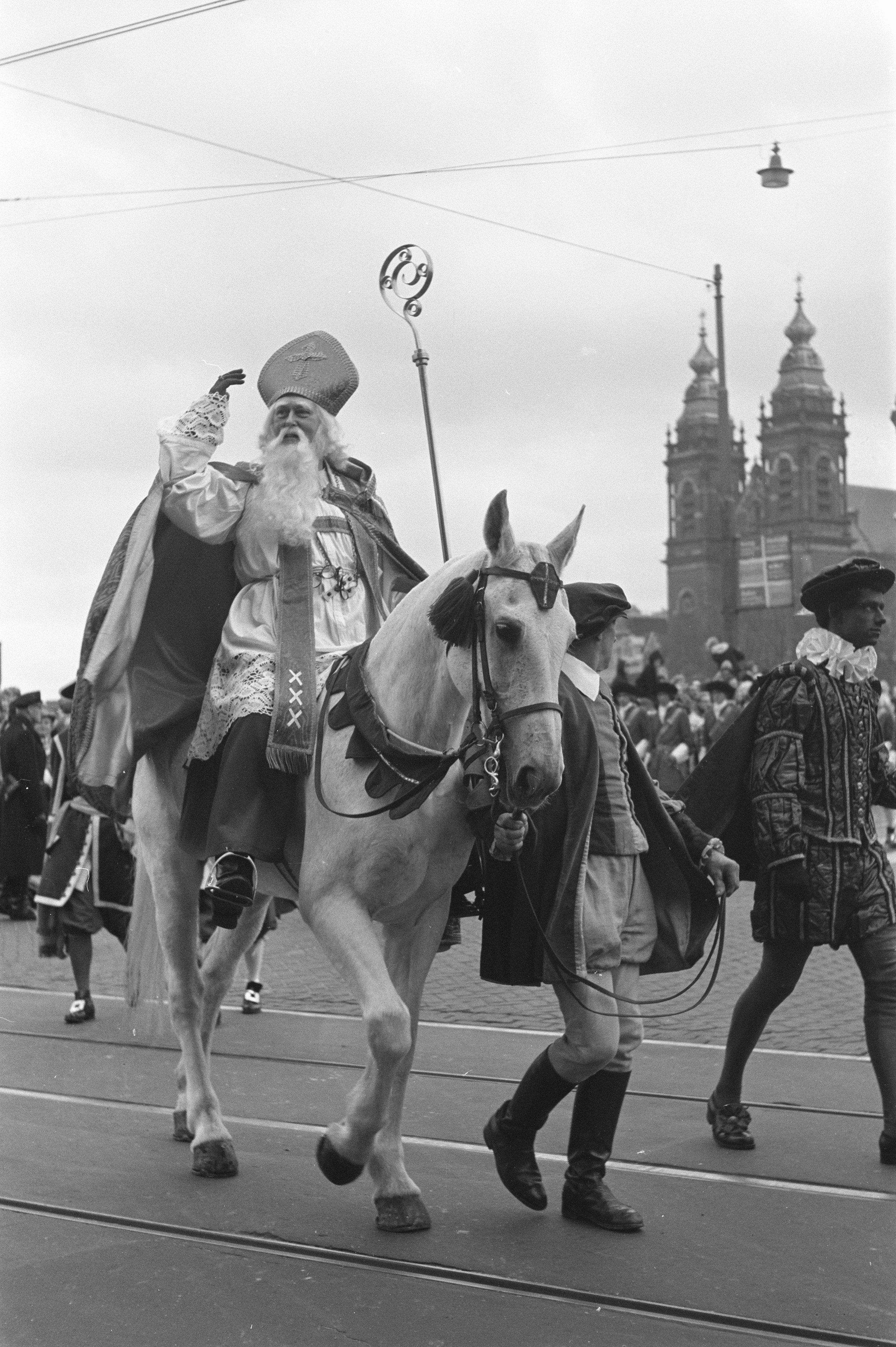 Collectie / Archief : Fotocollectie Anefo Reportage / Serie : [ onbekend ] Beschrijving : Intocht van Sint Nicolaas te Amsterdam, Sint Nicolaas aan het begin van het Damrak Datum : 14 november 1959 Locatie : Amsterdam, Noord-Holland Trefwoorden : Intocht Persoonsnaam : Sinterklaas Fotograaf : Pot, Harry / Anefo Auteursrechthebbende : Nationaal Archief Materiaalsoort : Negatief (zwart/wit) Nummer archiefinventaris : bekijk toegang 2.24.01.05 Bestanddeelnummer : 910-8215